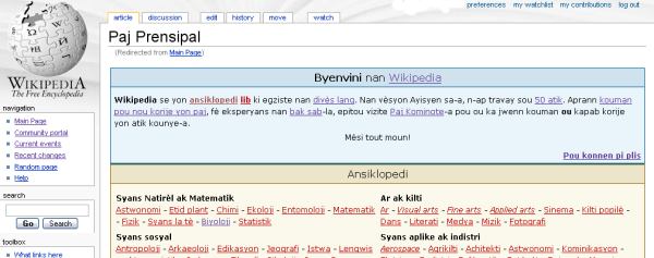 Kreyòl ayisyen : Ekran paj prensipal Wikipedia